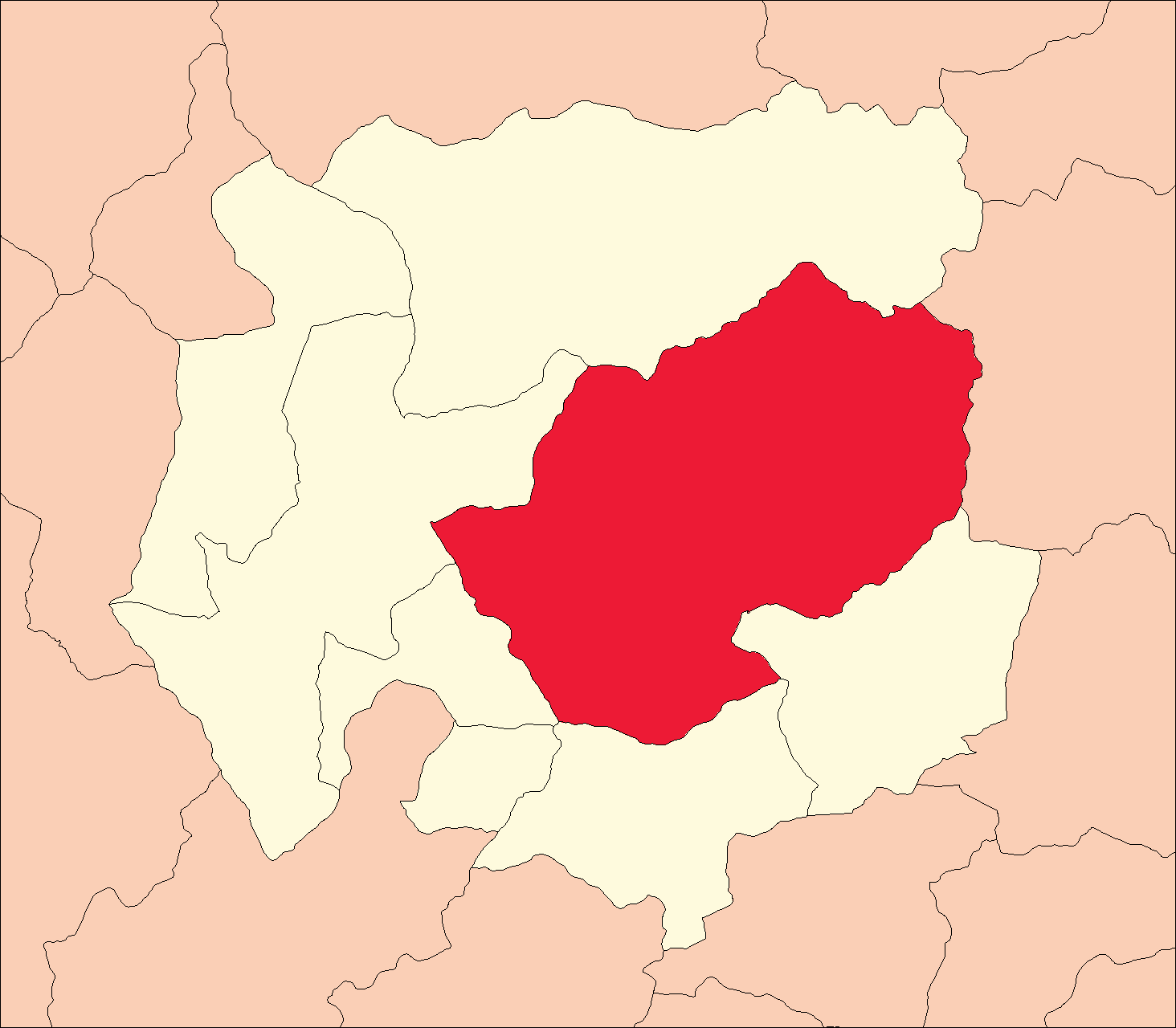 Ubicación del distrito de Chavinillo.